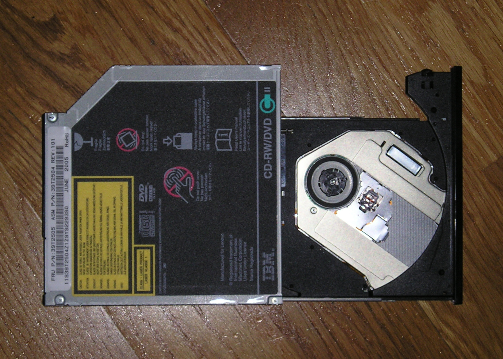 IBM Ultrabay Slim DVD Lese- CDRW Schreiblaufwerk geöffnet